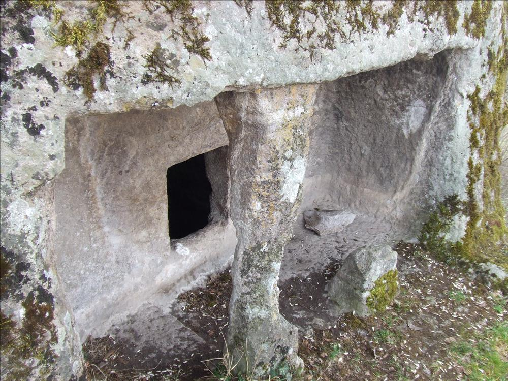 Ordu iline bağlı Aybastı ilçesinden bir görünüm.